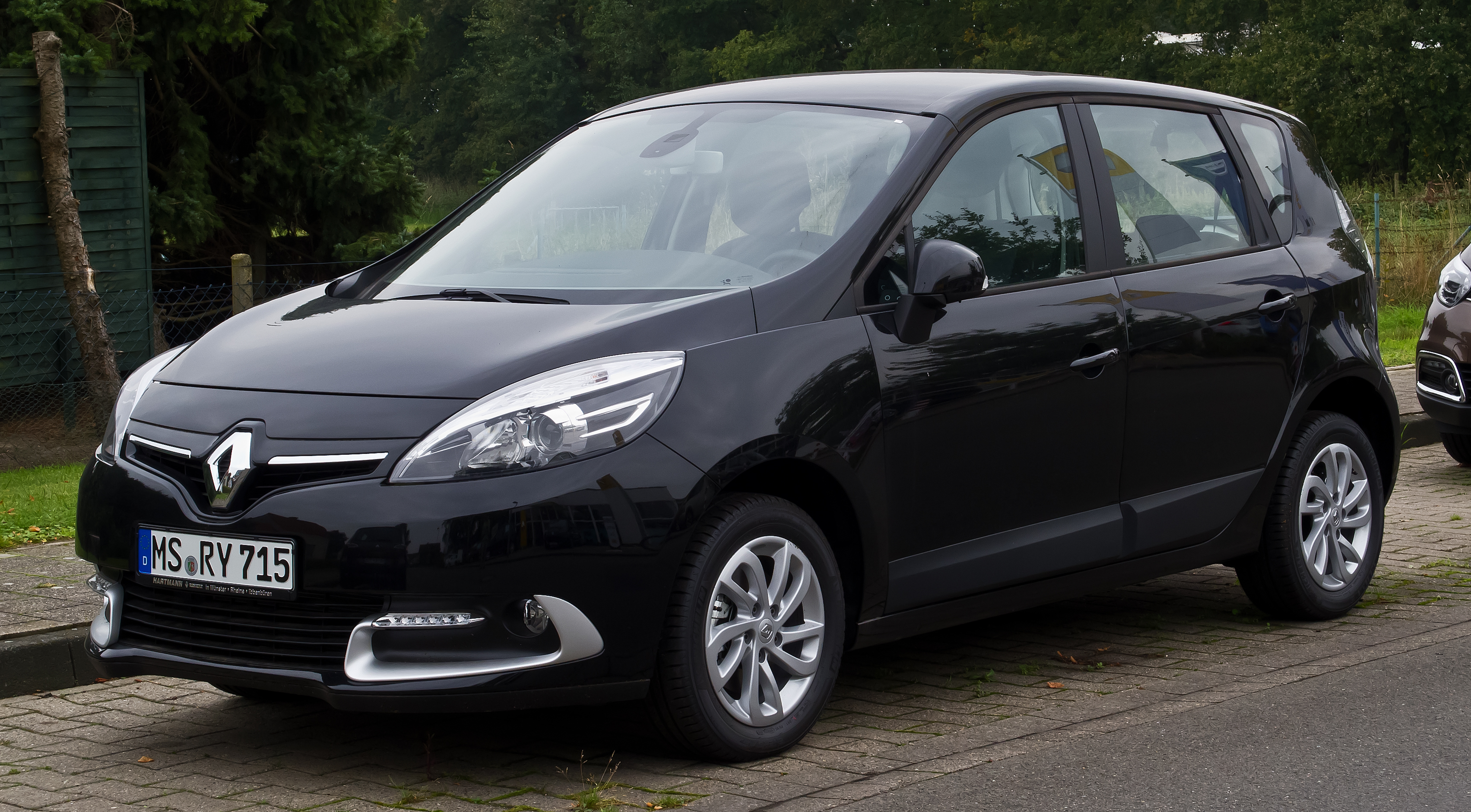 Renault Scénic Paris Deluxe 110 (III, 2. Facelift)